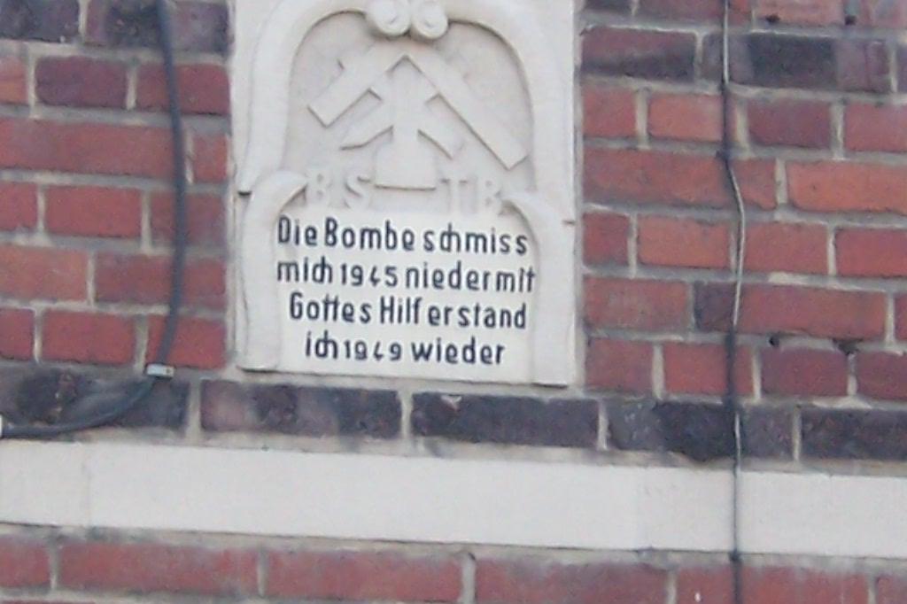 Haus in Stadtlohn (Inschrift Zerstörung 1945 und Wiederaufbau 1949)